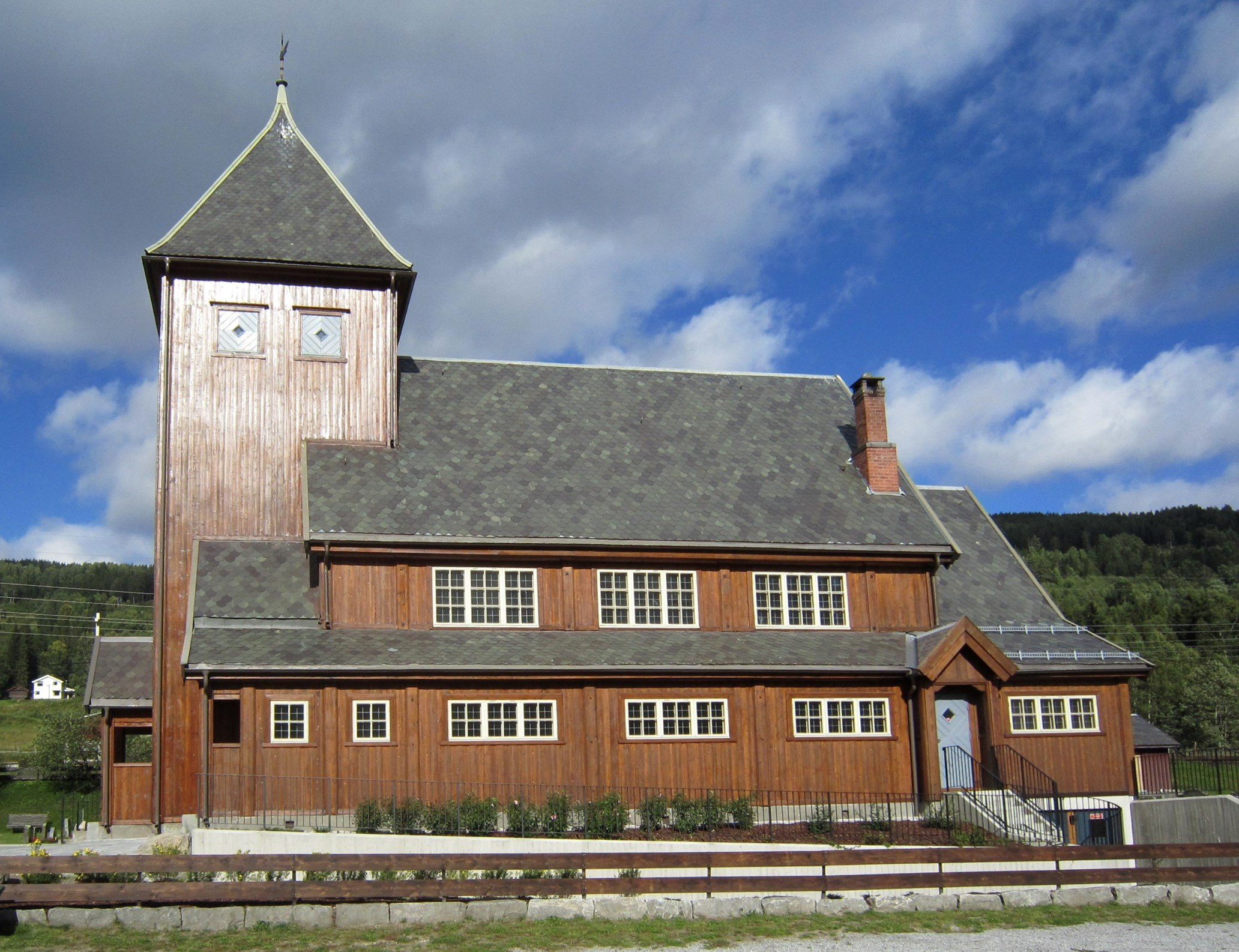 Herad kirke, Gol